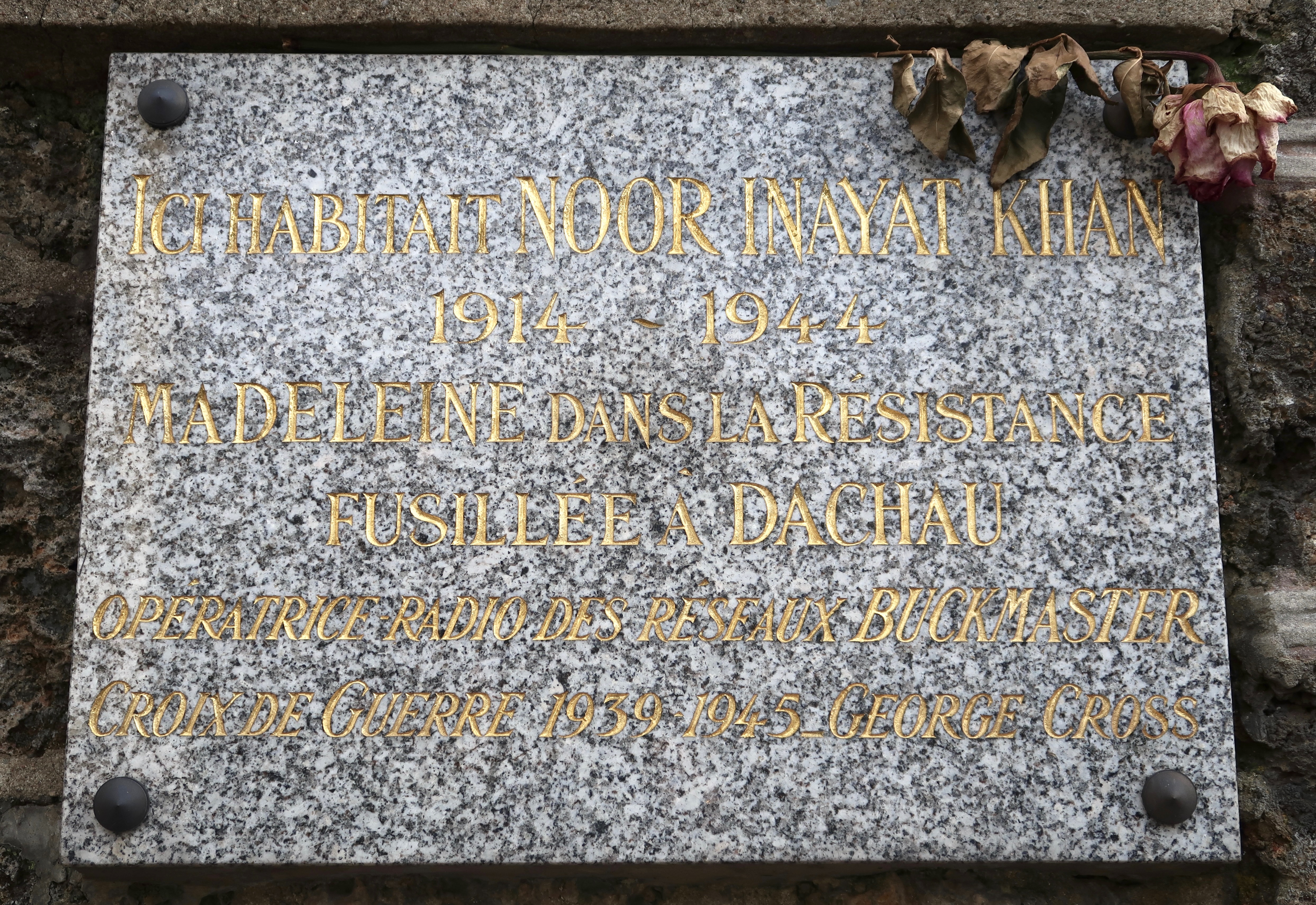 Plaque en hommage à la résistante Noor Inayat Khan qui habita la maison située 23 rue de la Tuilerie à Suresnes (Hauts-de-Seine).